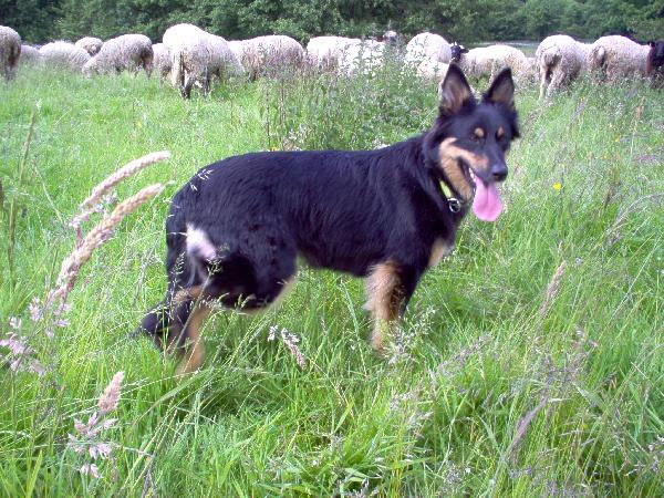 Altdeutscher hütehund, Gelbbacke